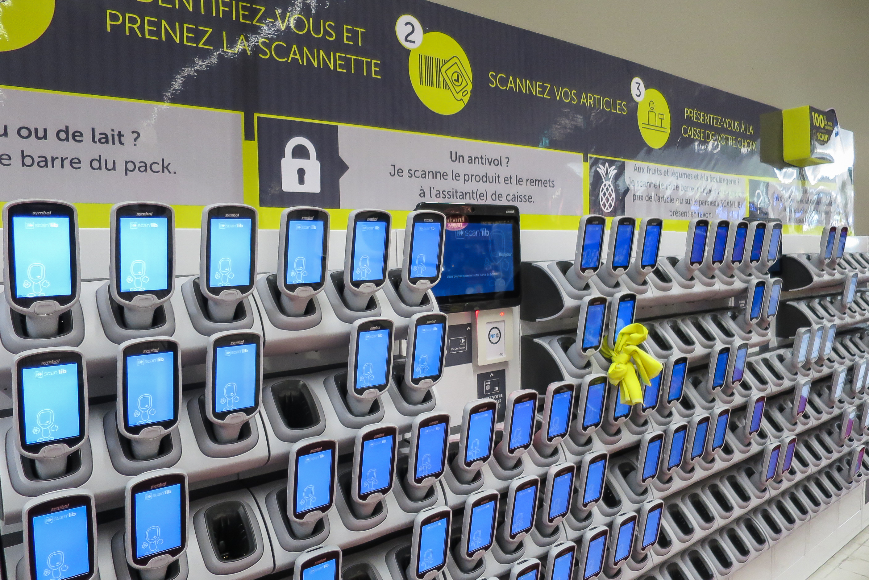 Scannette Scan'Lib du magasin Carrefour de Villabé / Villabé, Essonne, France